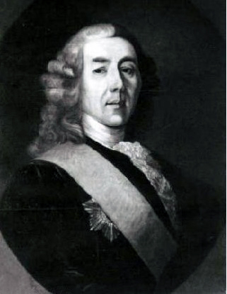 Portrait of François Guillemot de Villebois (1681–1760)